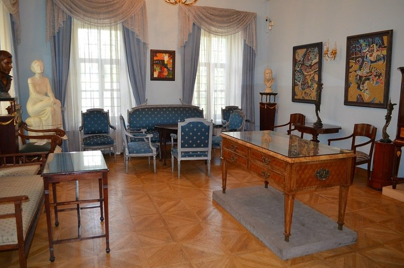 Интерьеры Музея мебели в Москве, мебель отреставрированная мастерской при учреждении